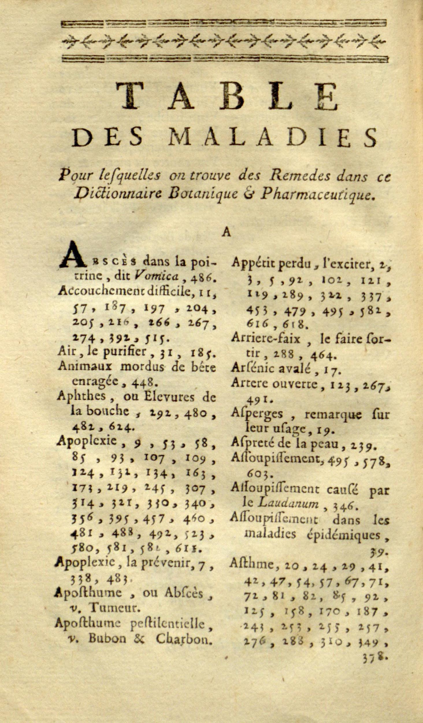 Dictionnaire botanique et pharmaceutique, contenant les principales propriétés des minéraux, des végétaux, et des animaux d'usage aves les préparations de pharmacie...par***.